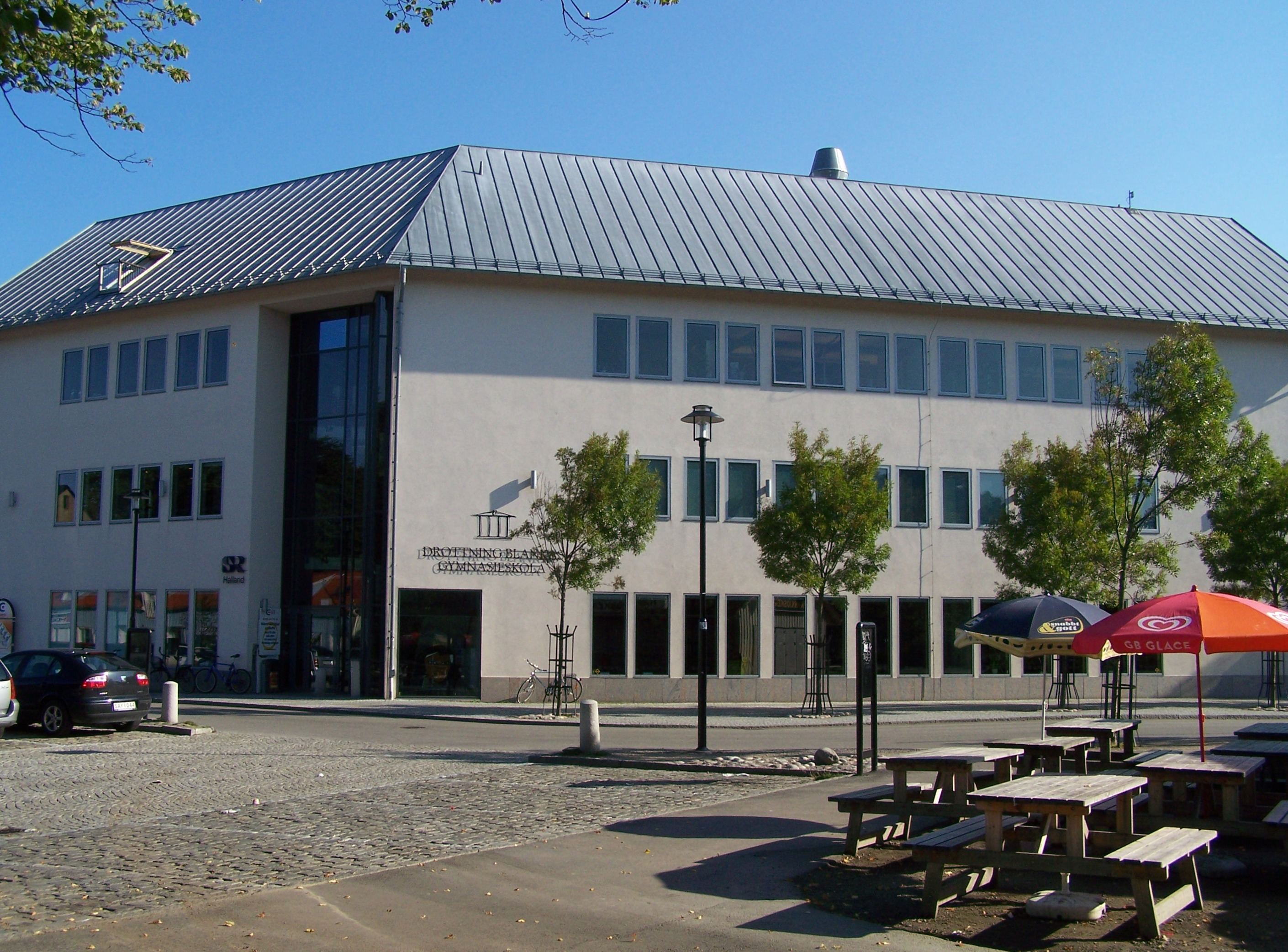 Drottning Blankas gymnasium